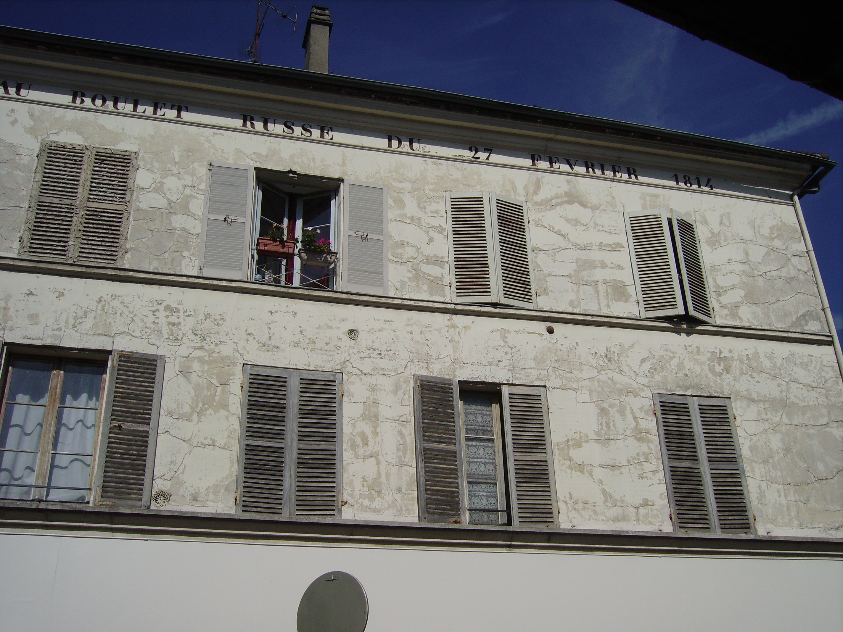 Meaux (Seine-et-Marne) : La maison au boulet russe